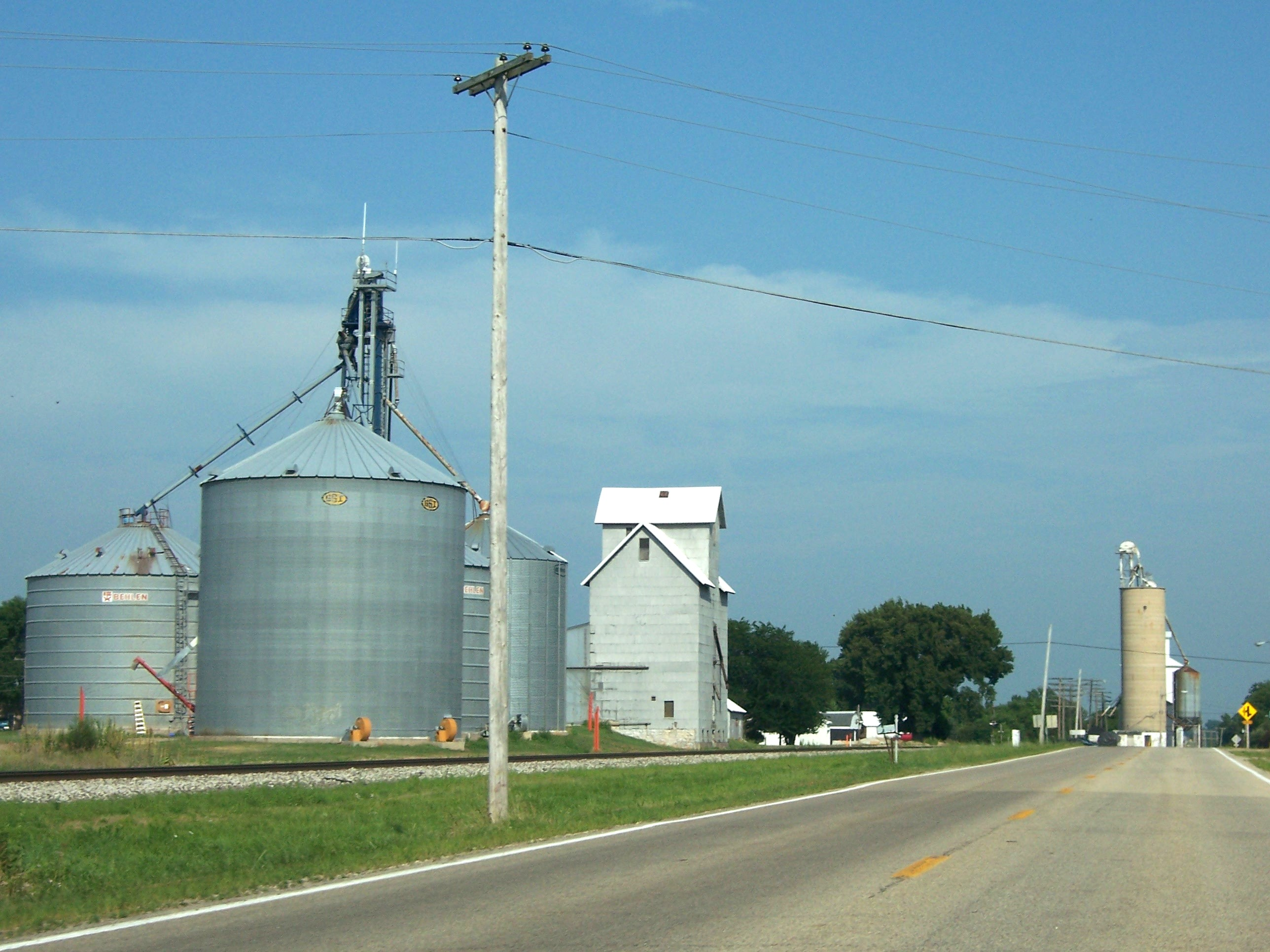 Grain elevator in Mineral, Illinois.